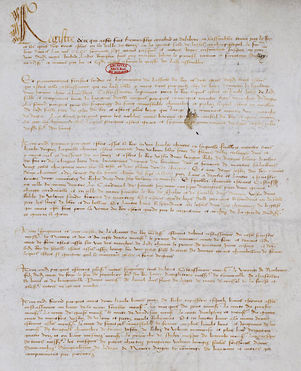 Procès-verbal des états généraux tenus à Tours du 6 au 14 avril 1468 en présence du roi Louis XI.